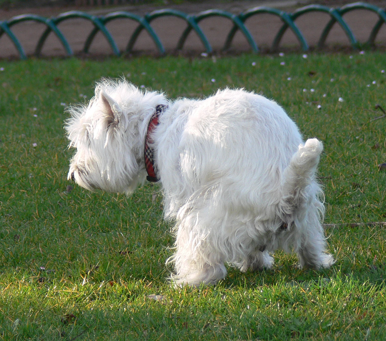 sans commentaires.. CACAAAAAAAAAAAAAAAAAAAAAAAAAAAAAAAAAA!!!!!!!!!!!!!!!!!!!!!!!!!!!!!!! Lieu : espace vert, ville de Lille. photo : DC MT, mise à disposition sur Wiki commons